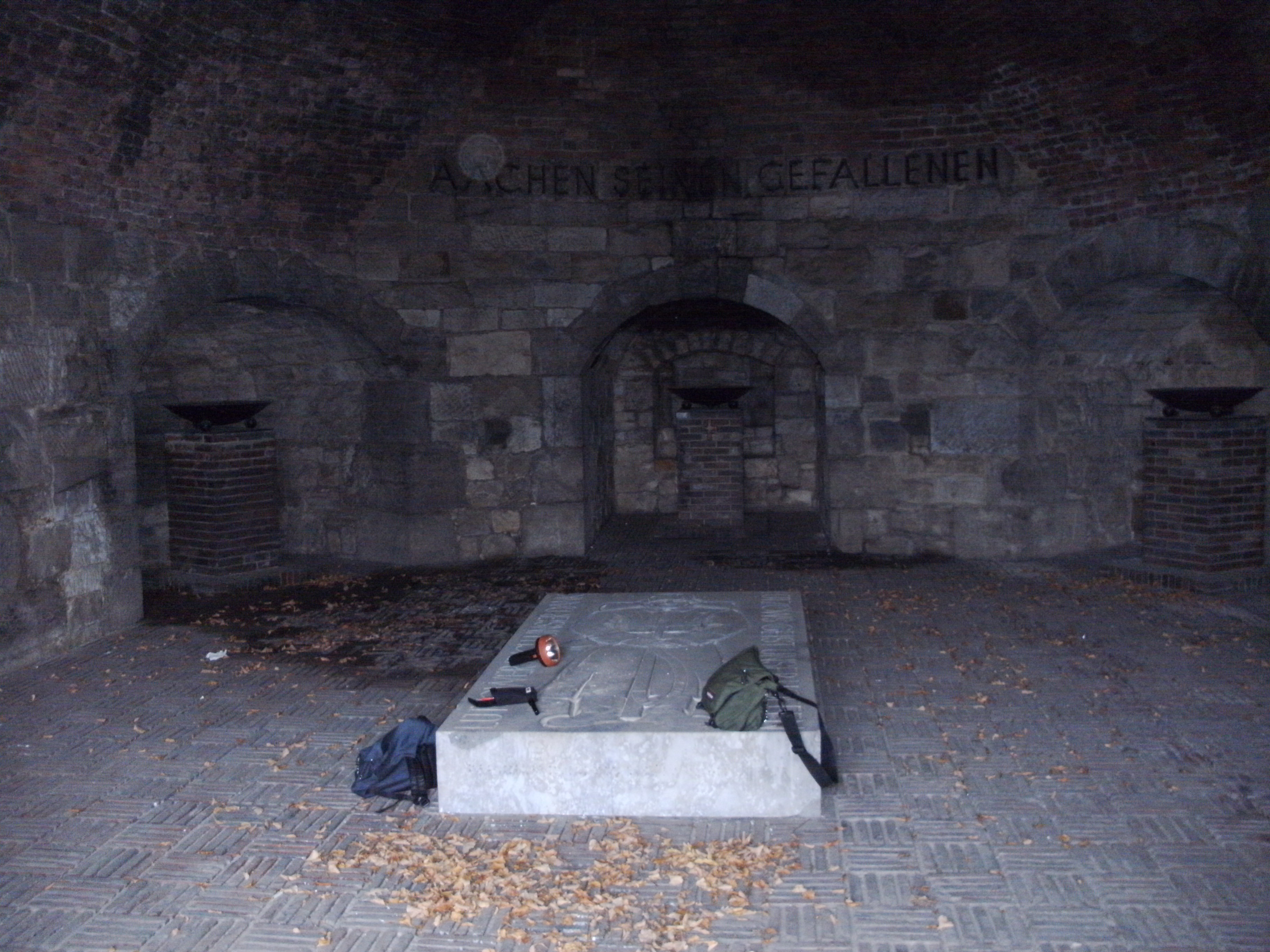 Marienburg Aachen - Gedenkstätte